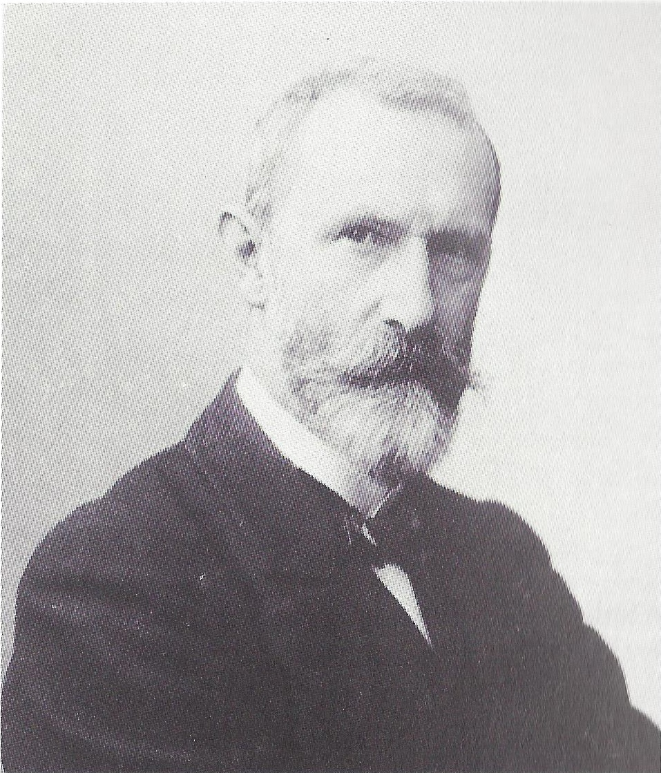 Porträtotografie von Prof. Dr. med. Heinrich Helferich (1851-1945)